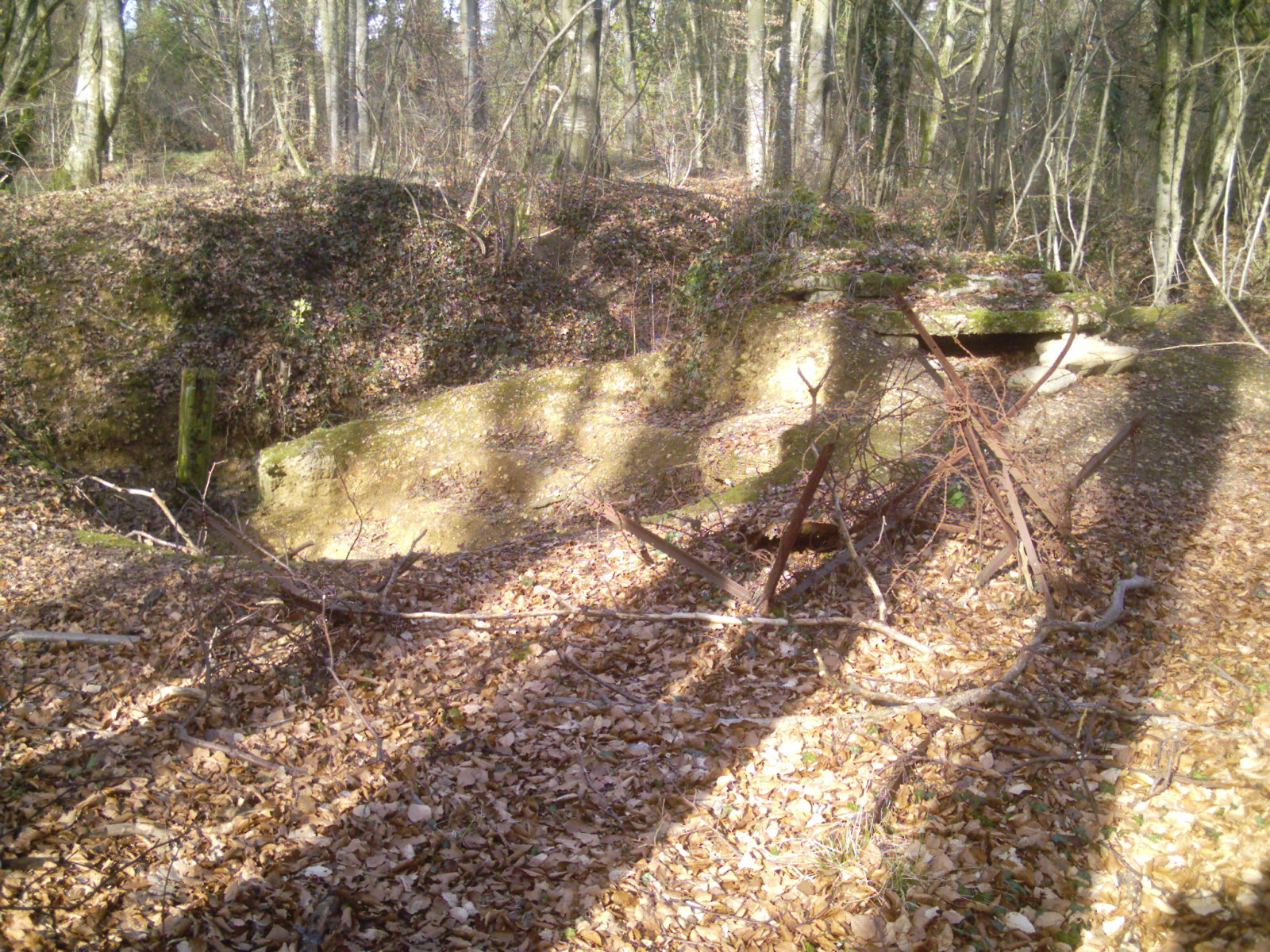 Observatoire des tranchés de la croix des Carmes